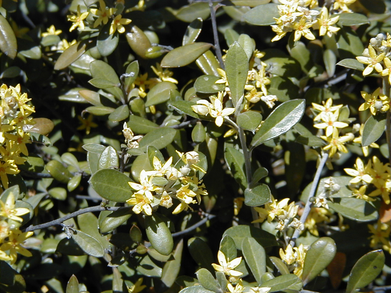 Corokia virgata. Real Jardín Botánico, Madrid.